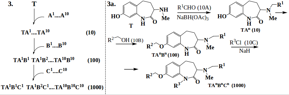 Բիլդինգ բլոկների օգնությամբ կոմբինատորային գրադարանների ստեղծումը